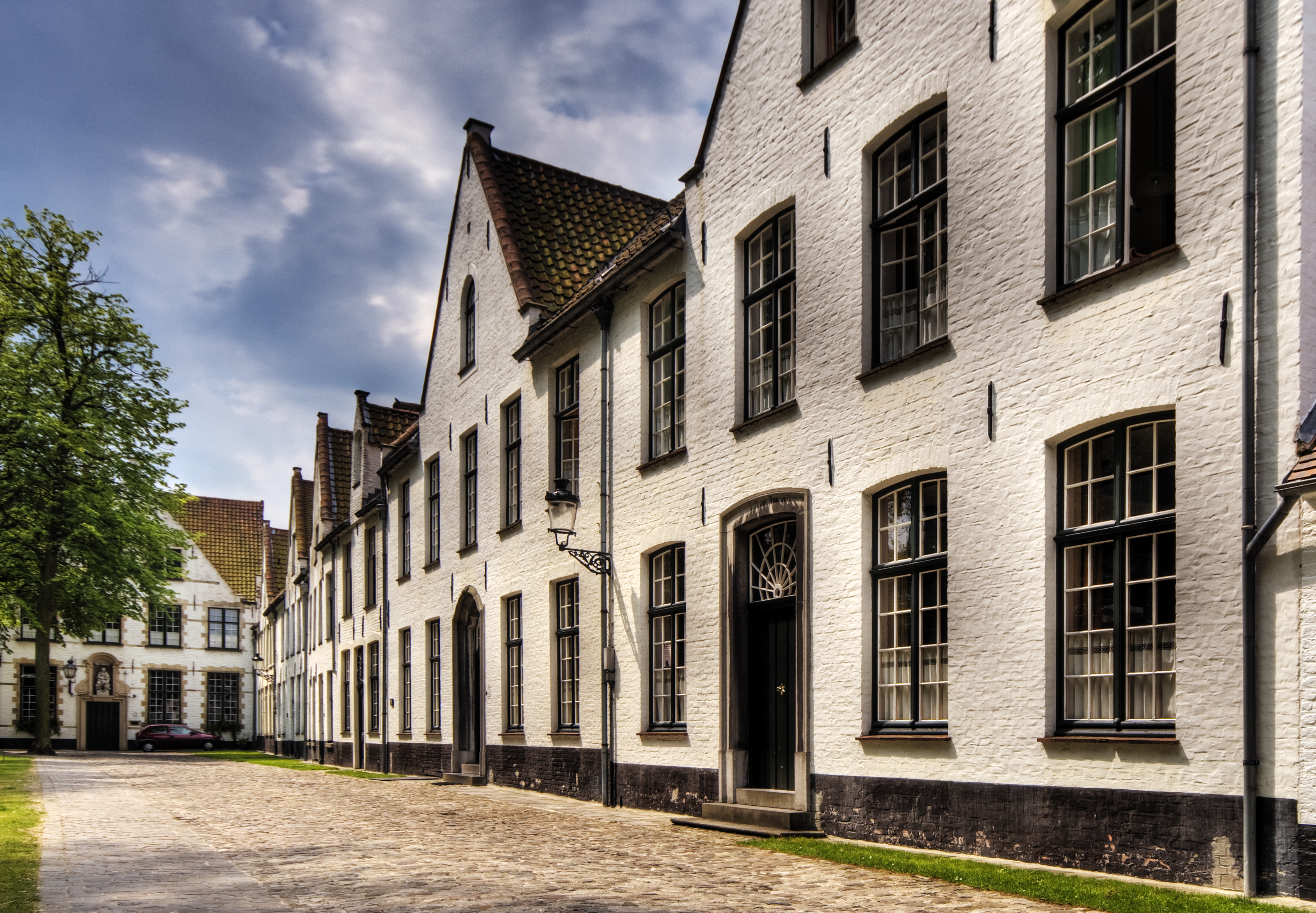 Please take a large view! Ein Beginenhof ist die typische Wohnanlage der Beginen, die vor allem im belgischen Flandern und in den Niederlanden vorkommt. Ein Beginenhof liegt in einer Stadt und besteht meistens aus einem um einen Innenhof gruppierten architektonischen Ensemble, bestehend aus kleinen Wohnhäusern der Beginen, einer Kapelle, Nebengebäuden und oft einem größeren Haus für die Beginenmeisterin und mit einem Versammlungsraum. Häufig ist der Innenhof als idyllischer Nutz- und Ziergarten oder Grünanlage gestaltet. Die Anlage ist durch Mauern oder Wassergräben klar von dem Rest der Stadt abgegrenzt. In den Giebeln der Beginenhäuschen befinden sich oft religiöse Sprüche, Heiligen- oder Marienbilder oder die Namen der Schutzheiligen der Bewohnerinnen. Da es heutzutage fast keine Beginen mehr gibt, werden die Wohnhöfe auch von älteren Leuten, Künstlern und Studenten bewohnt. Die kleinen Häuser sind dazu in der Regel restauriert und renoviert worden. Die meisten Beginenhöfe befinden sich in Belgien und sind wegen ihres Alters, der Ruhe und der schlichten harmonischen Architektur malerisch und sehenswürdig. Von ehemals 80 Anlagen sind noch rund 30 erhalten, unter anderem in Antwerpen, Brügge, Diest, Gent, Lier, Löwen, Mecheln, Turnhout; diese gehören seit 1998 zum Unesco-Weltkulturerbe. In den Niederlanden sind noch zwei Anlagen in Amsterdam und Breda erhalten. In Frankreich gibt es keine Höfe mehr. From Wikipedia, the free encyclopedia